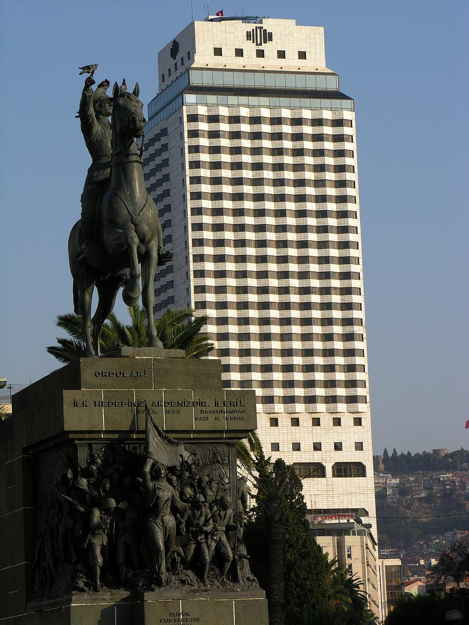 Turkey-2859